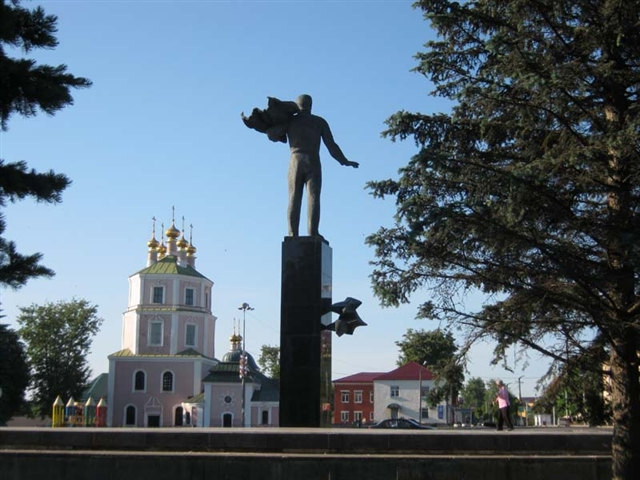 Церковь Казанская (Смоленская область, Гагарин, Красная площадь)